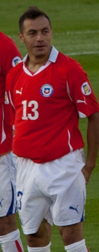 Marcelo Díaz vistiendo la camiseta de la Selección Chilena, en un encuentro ante el seleccionado uruguayo